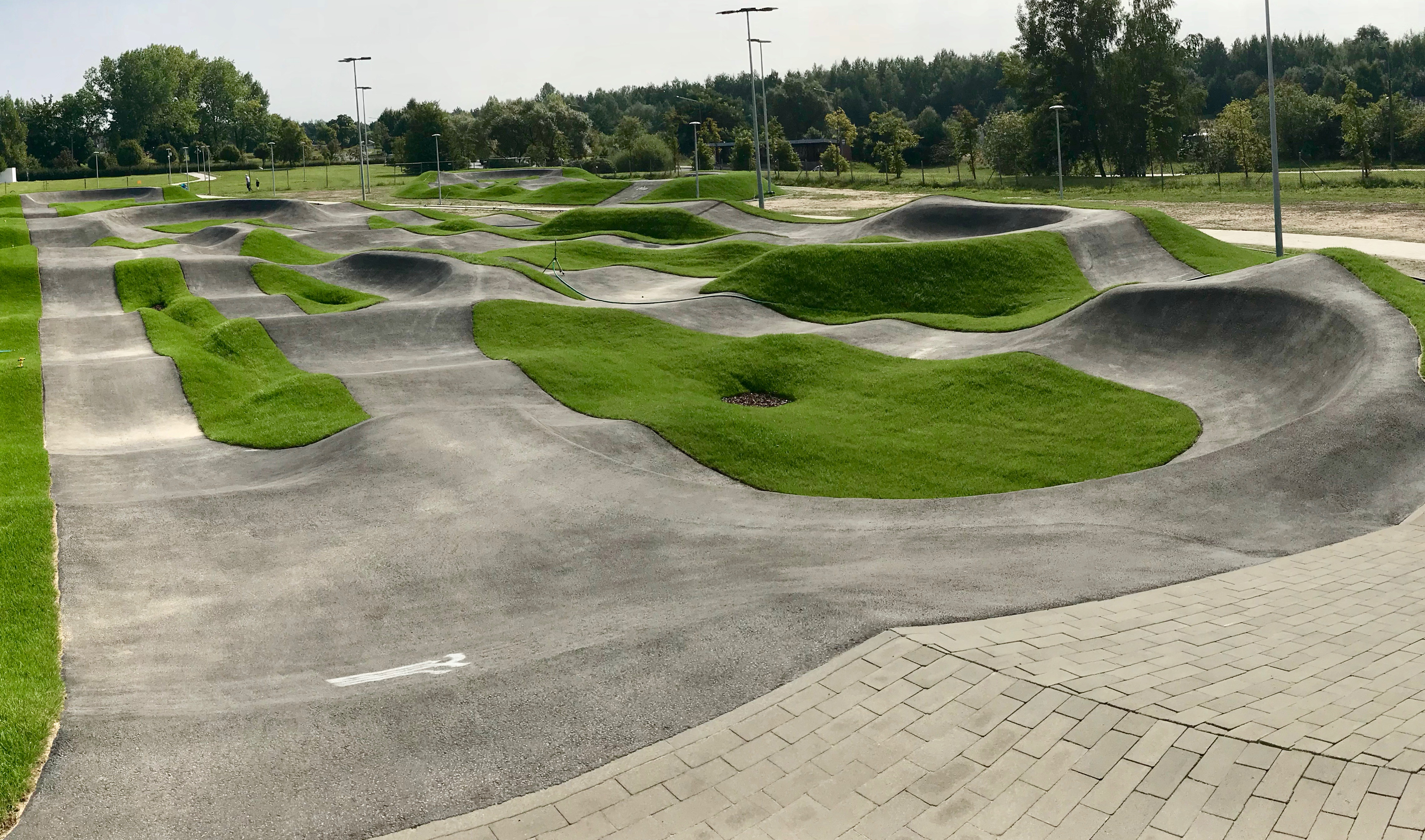 Asfaltowy pumptrack w Bełachatowie